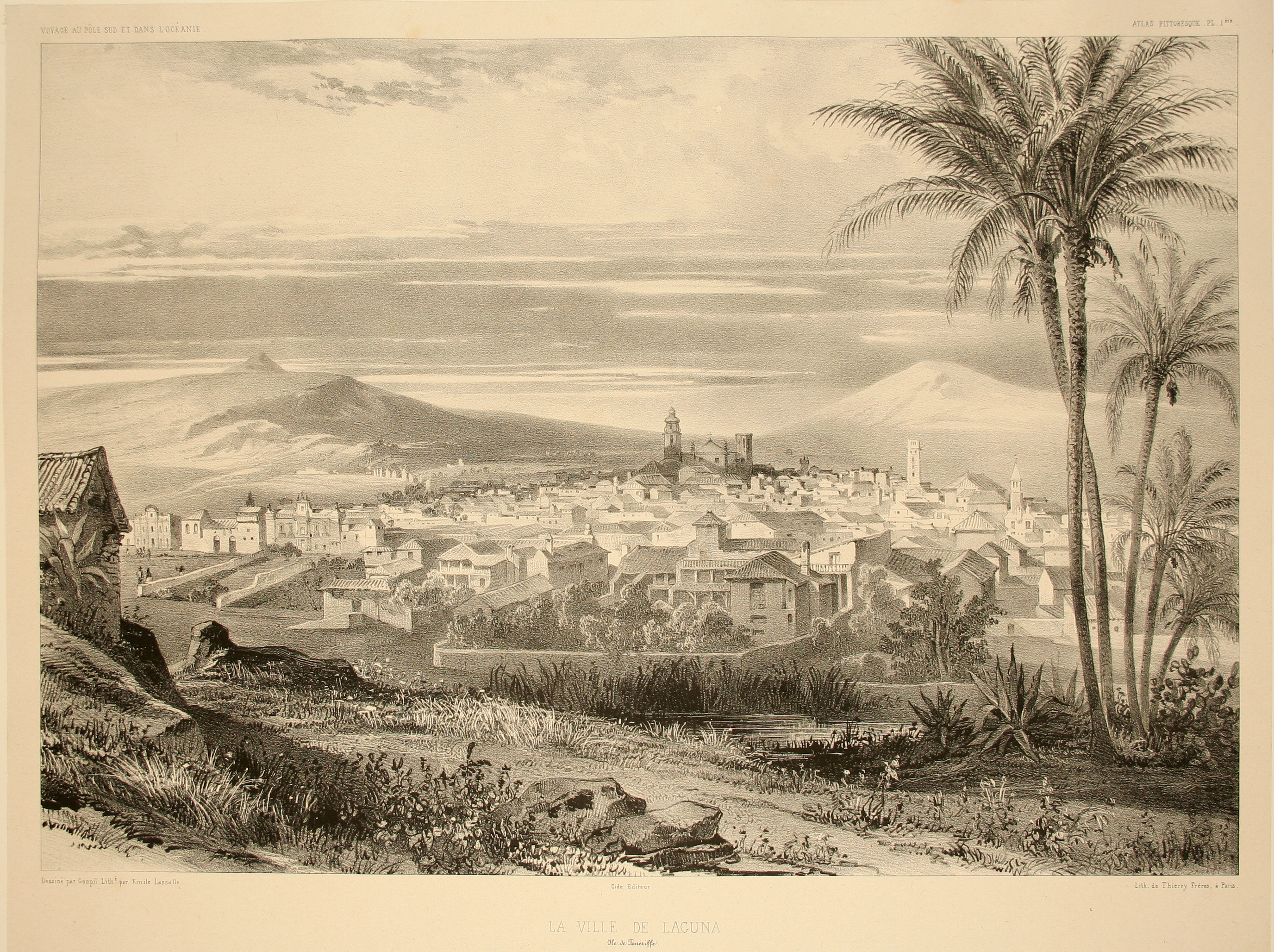 Ville de Laguna, Teneriffe. Atlas pittoresque, planche 01